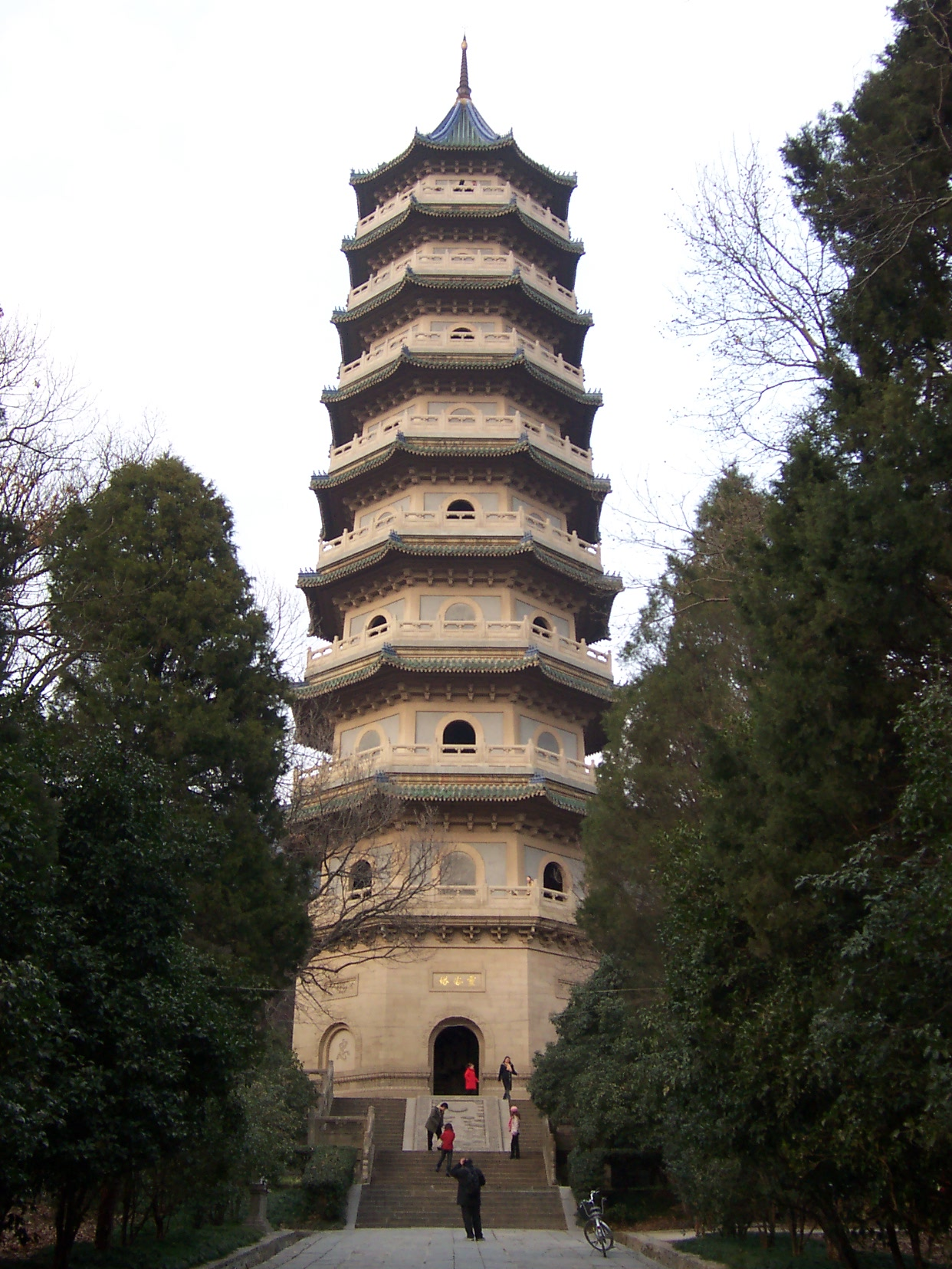 国民革命军阵亡将士纪念塔 许可协议 拍摄